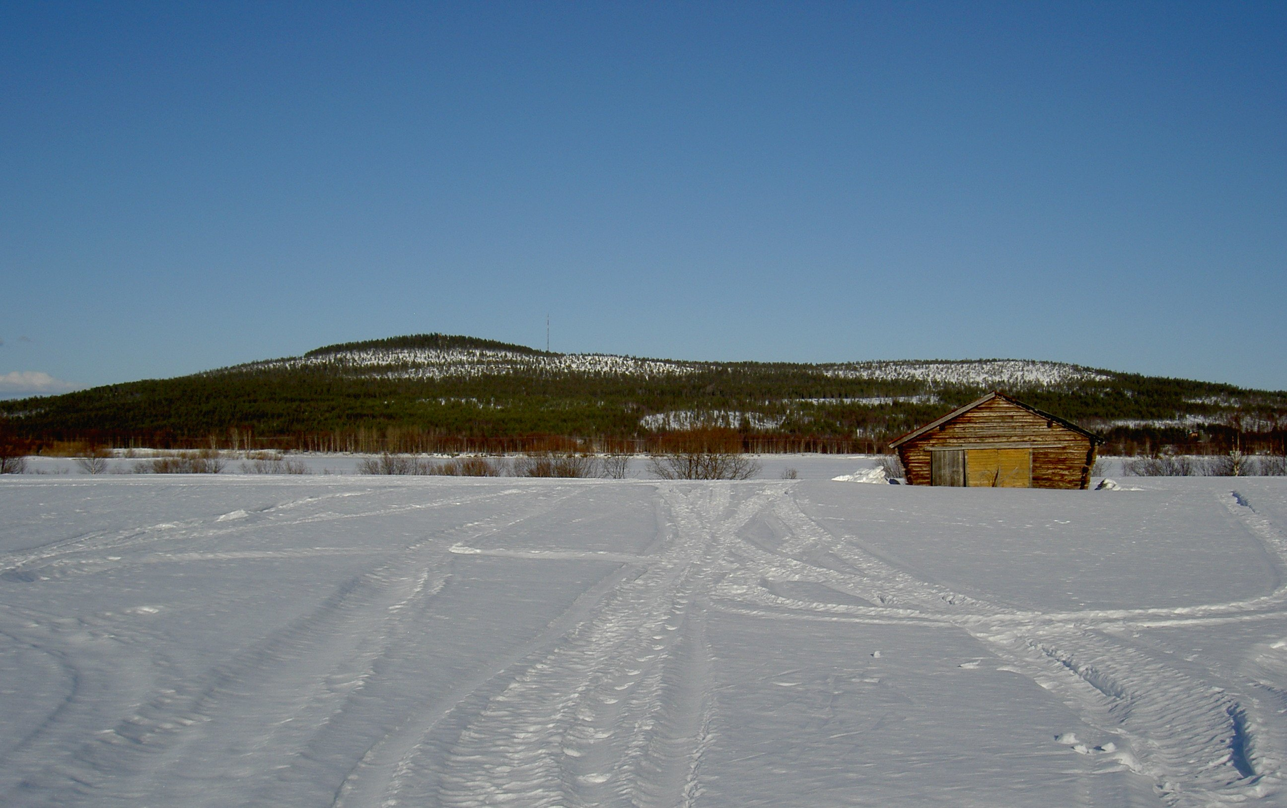 Berget Aavasaksa sett från väster.